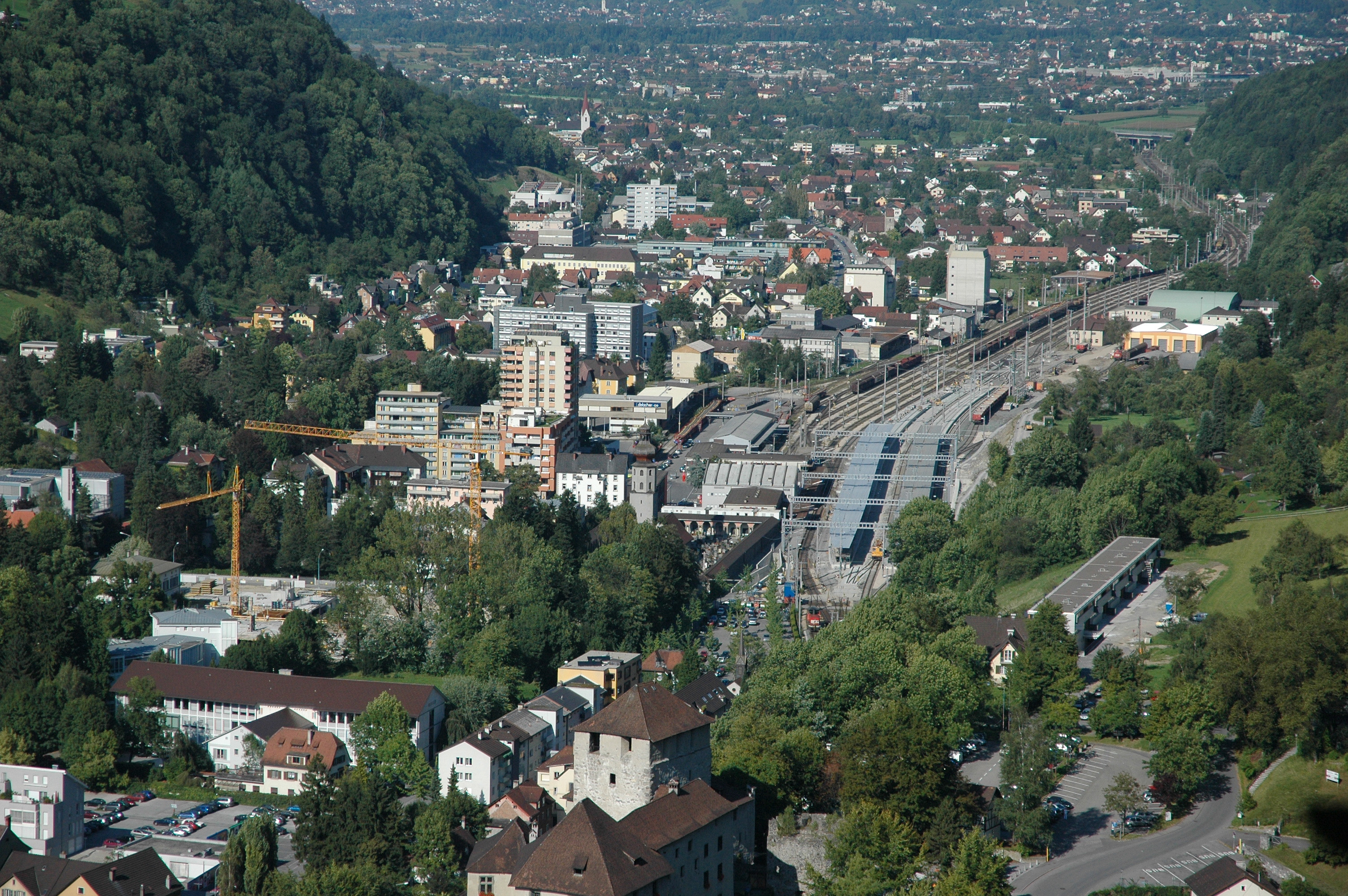 Feldkirch-Levis, Blick vom Stadtschroffen (über Schattenburg) nach Altenstadt, rechts der Bahnhof Feldkirch